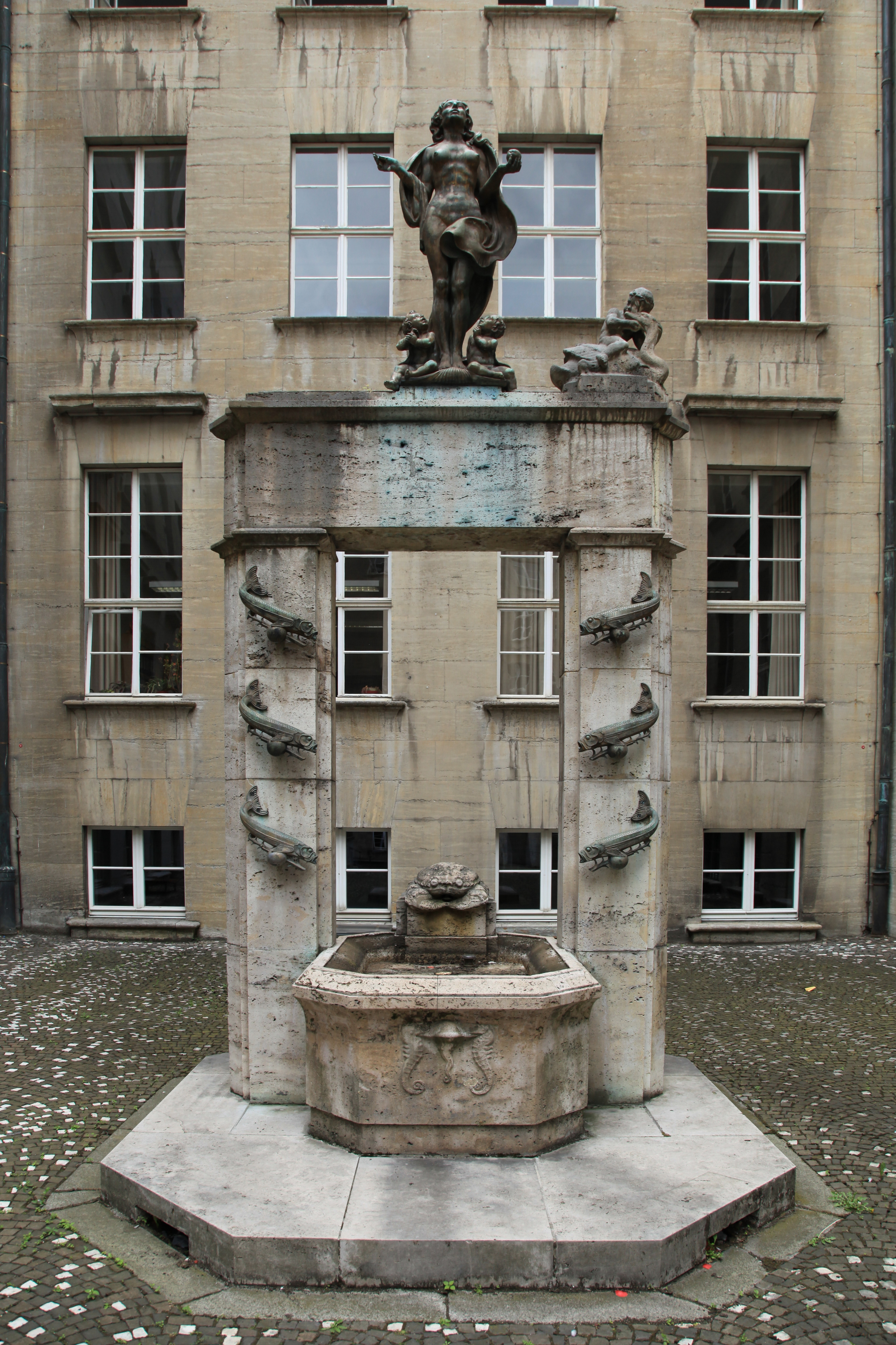 Brunnen der Schönheit von August Vogel im Innenhof des Rathauses am Willy-Brandt-Platz in Bochum